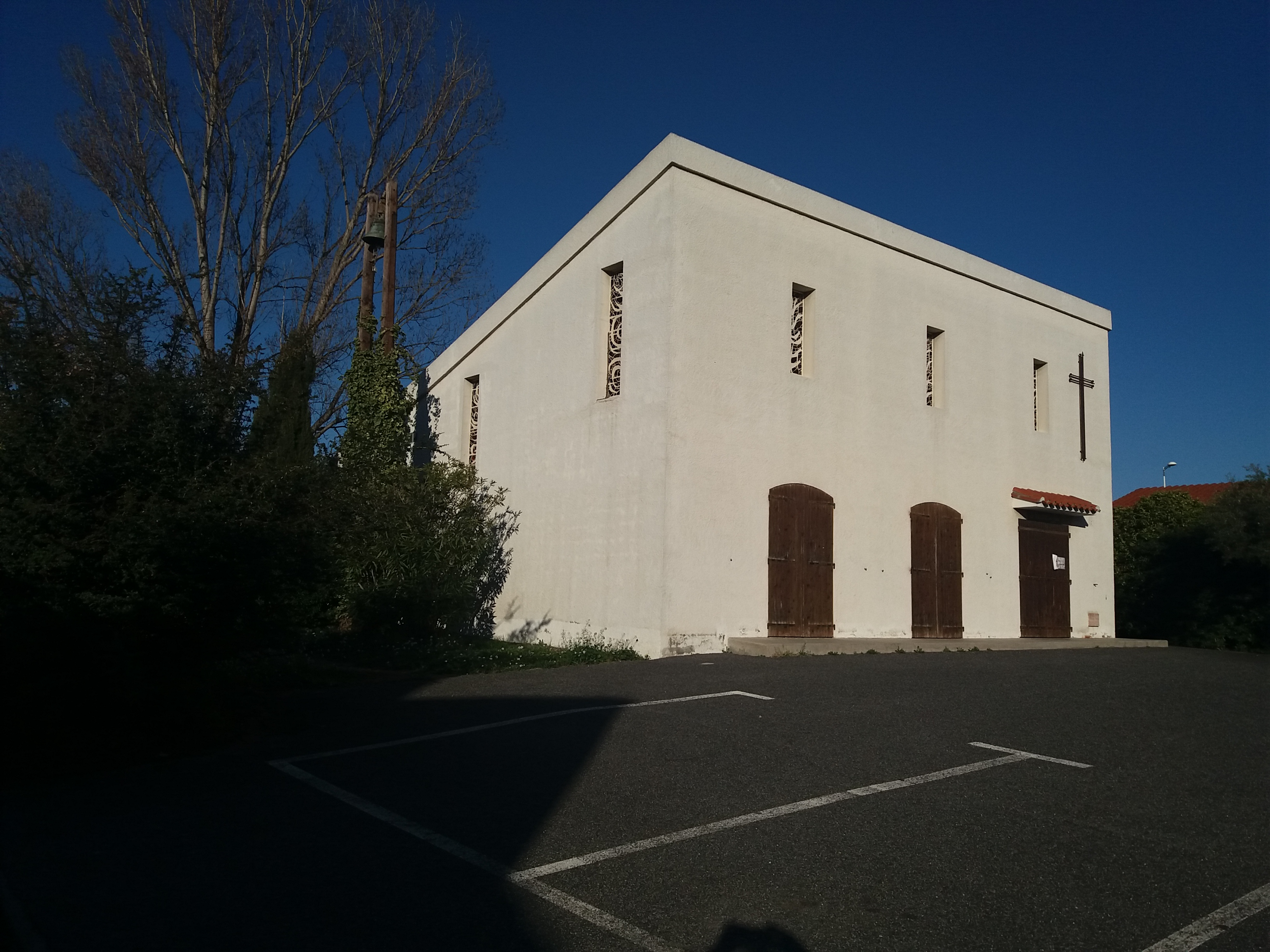 Sant Vicenç de Paül de Perpinyà